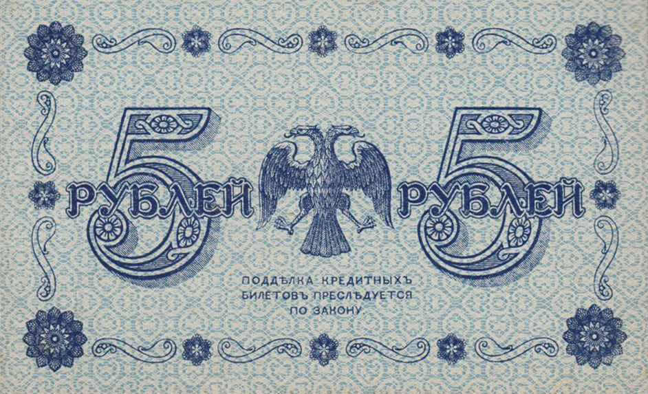 5 рублей образца 1918 года